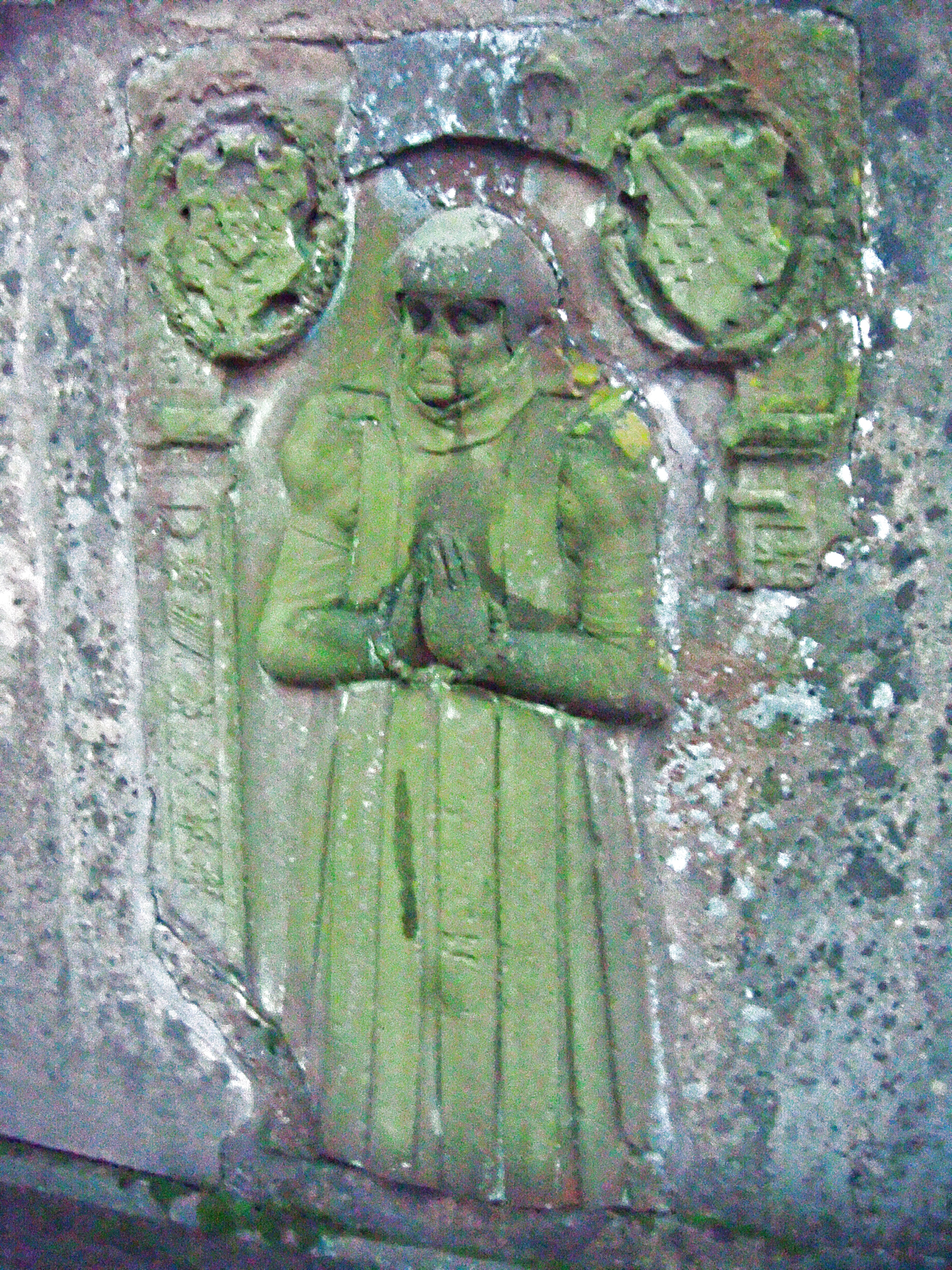 Brigitta von Pfalz-Simmern (1516-1562), letzte Benediktineräbtissin von Stift Neuburg bei Heidelberg, Rest ihres Epitaphs im Garten der Abtei